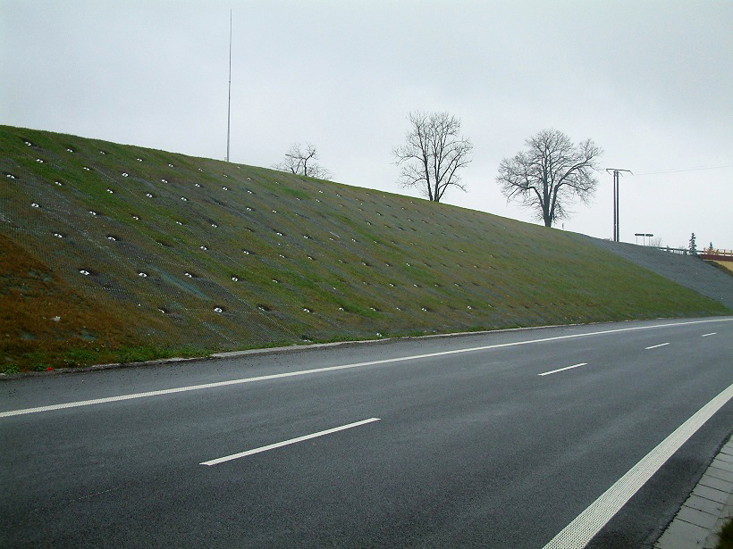 Droga ekspresowa S52 w miejscowości Grodziec. Zabezpieczenia skarp przy pomocy gwoździ gruntowych oraz siatki stalowej o wysokiej wytrzymałości Tecco.